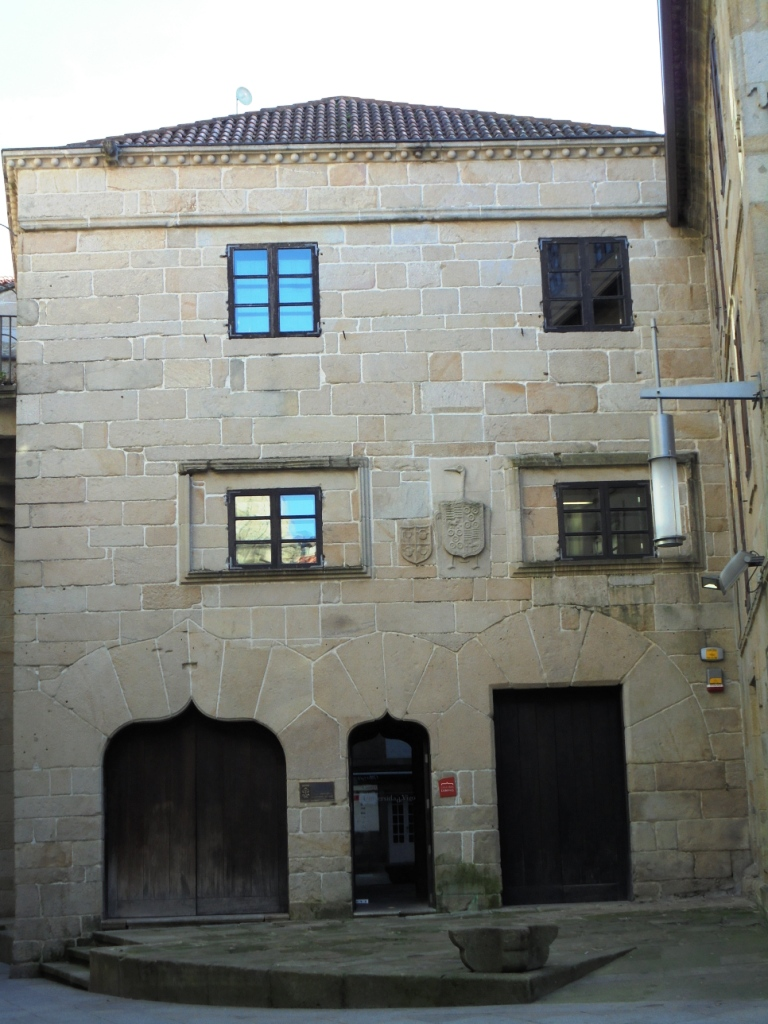 Casa de las Canpas (lápidas) en Pontevedra capital